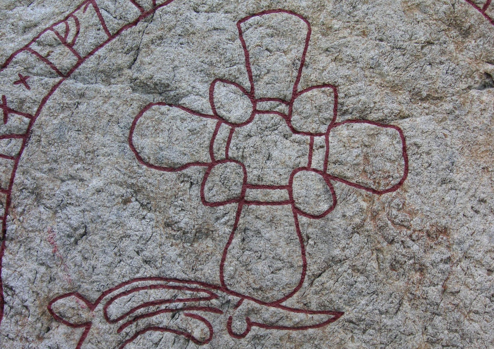 Södermanlands runinskrifter 311-313 är en runinskription i omedelbar anslutning till Holmfastvägen i Södertälje i Sörmland, detalj från Sö 312.